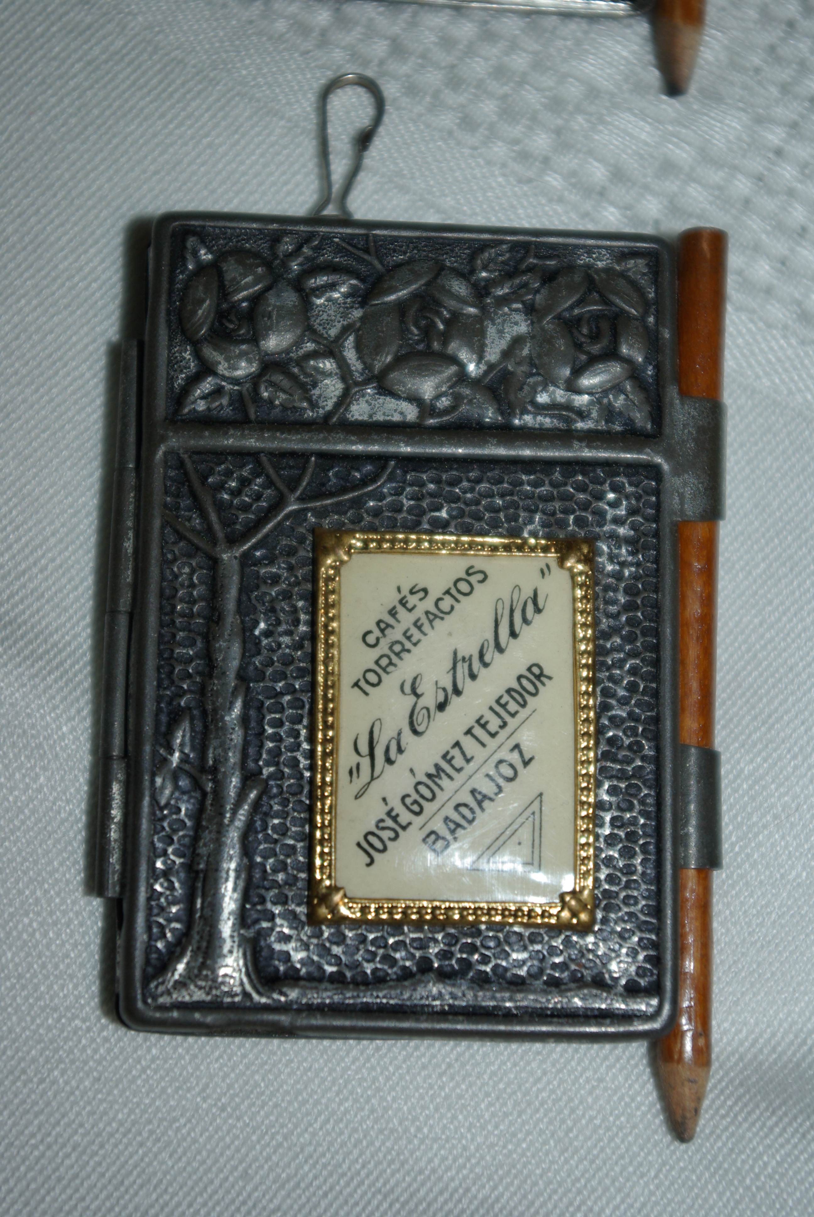 Block de notas propaganda de Cafés La Estrella en los años 10 del siglo XX